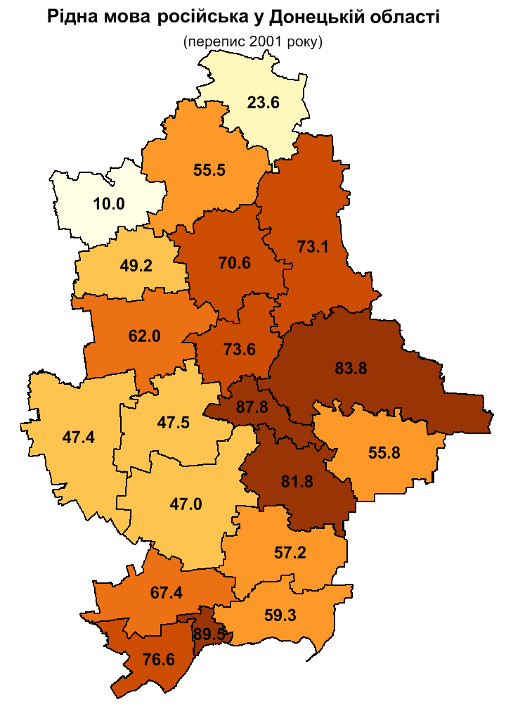 Рідна мова російська у Донецькій області за переписом 2001 р./ Russian as native language in Donetsk oblast, 2001 census